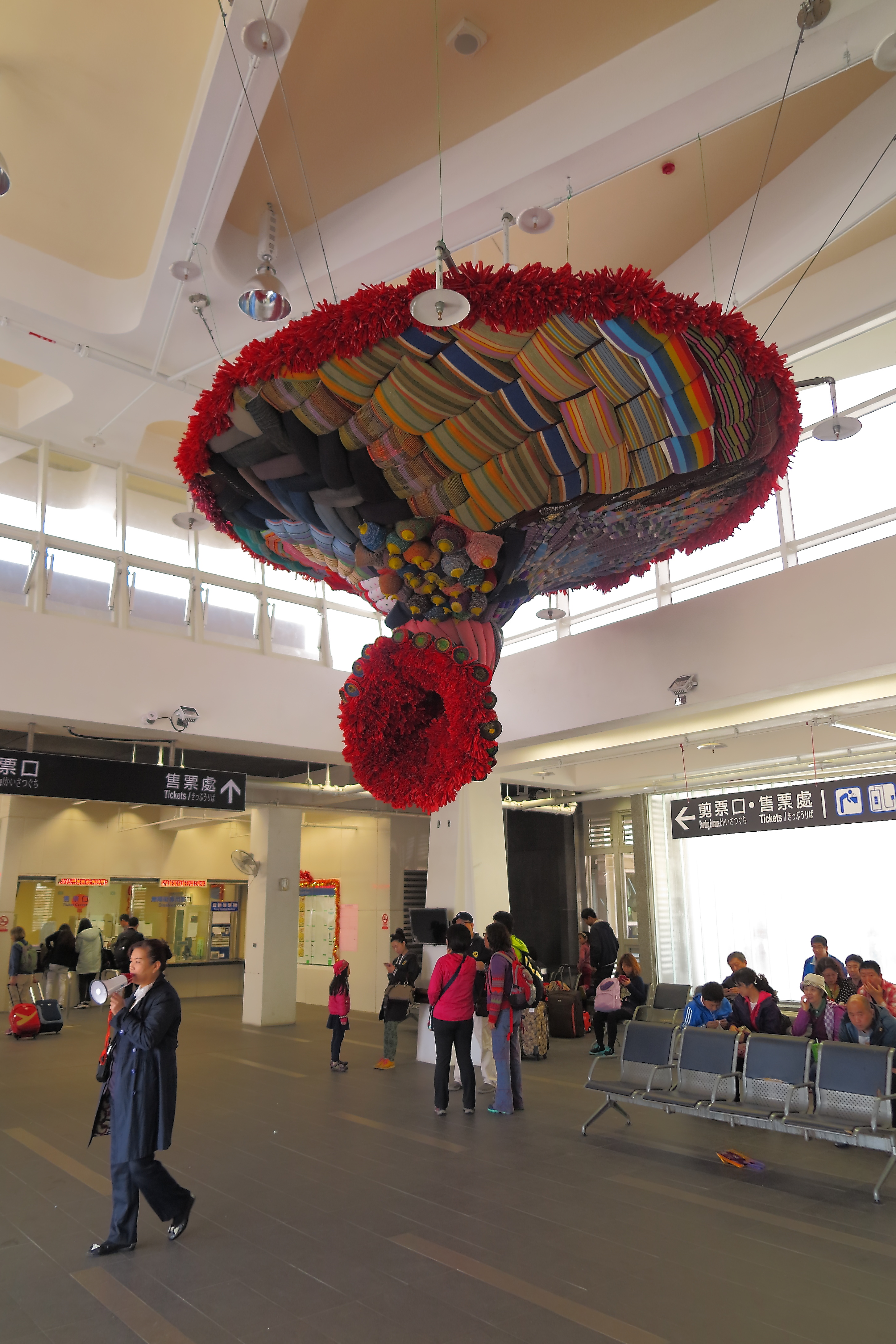 原住民技藝 織路